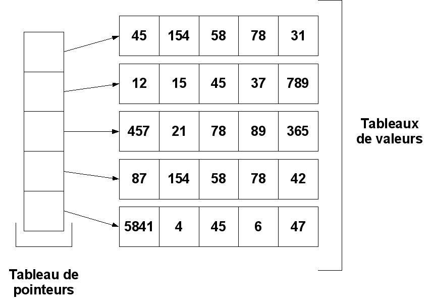 Représentation d'un tableau (en informatique) à deux dimension Origine : Je suis le créateur